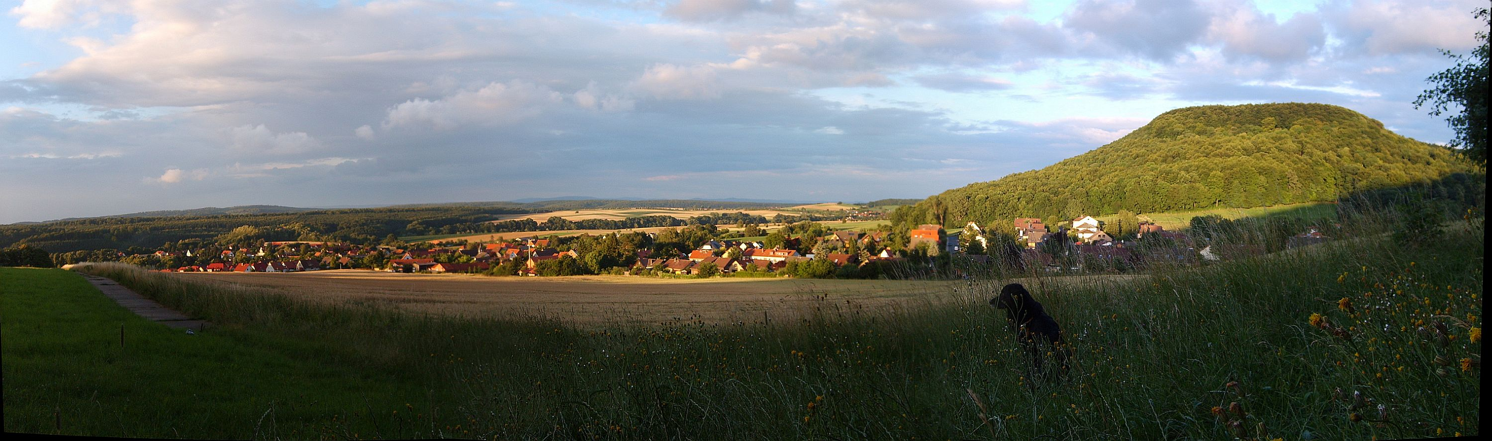 Eine Panorama-Aufnahme des Dorfes Reyershausen (rechts die Ratsburg am nördlichen Rand des Göttinger Waldes)